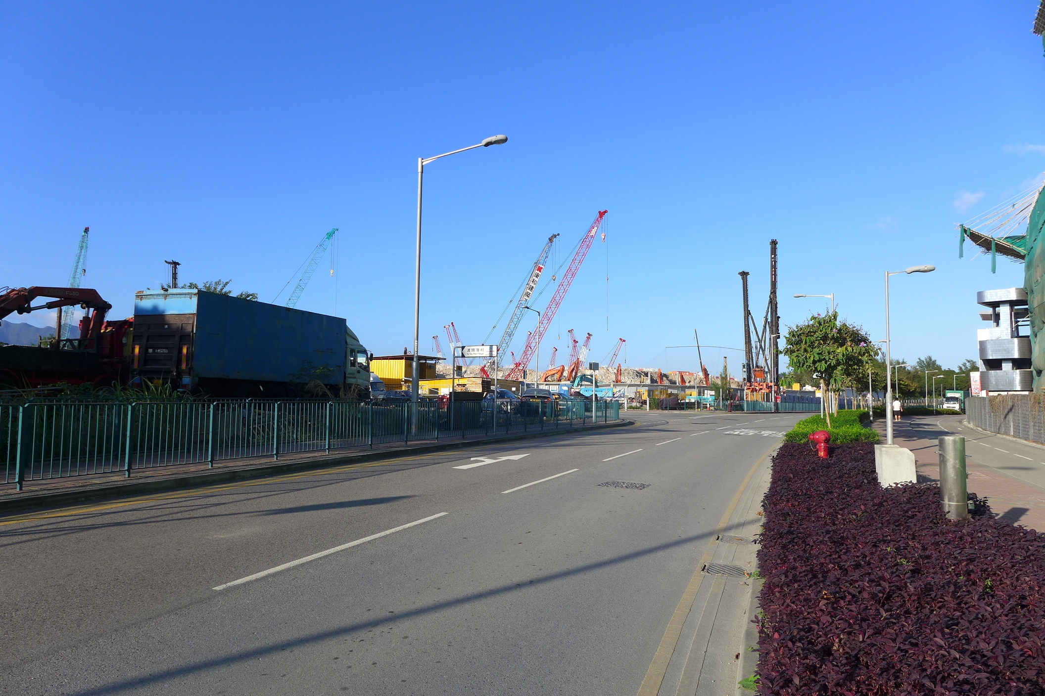 Yiu Sha Road_